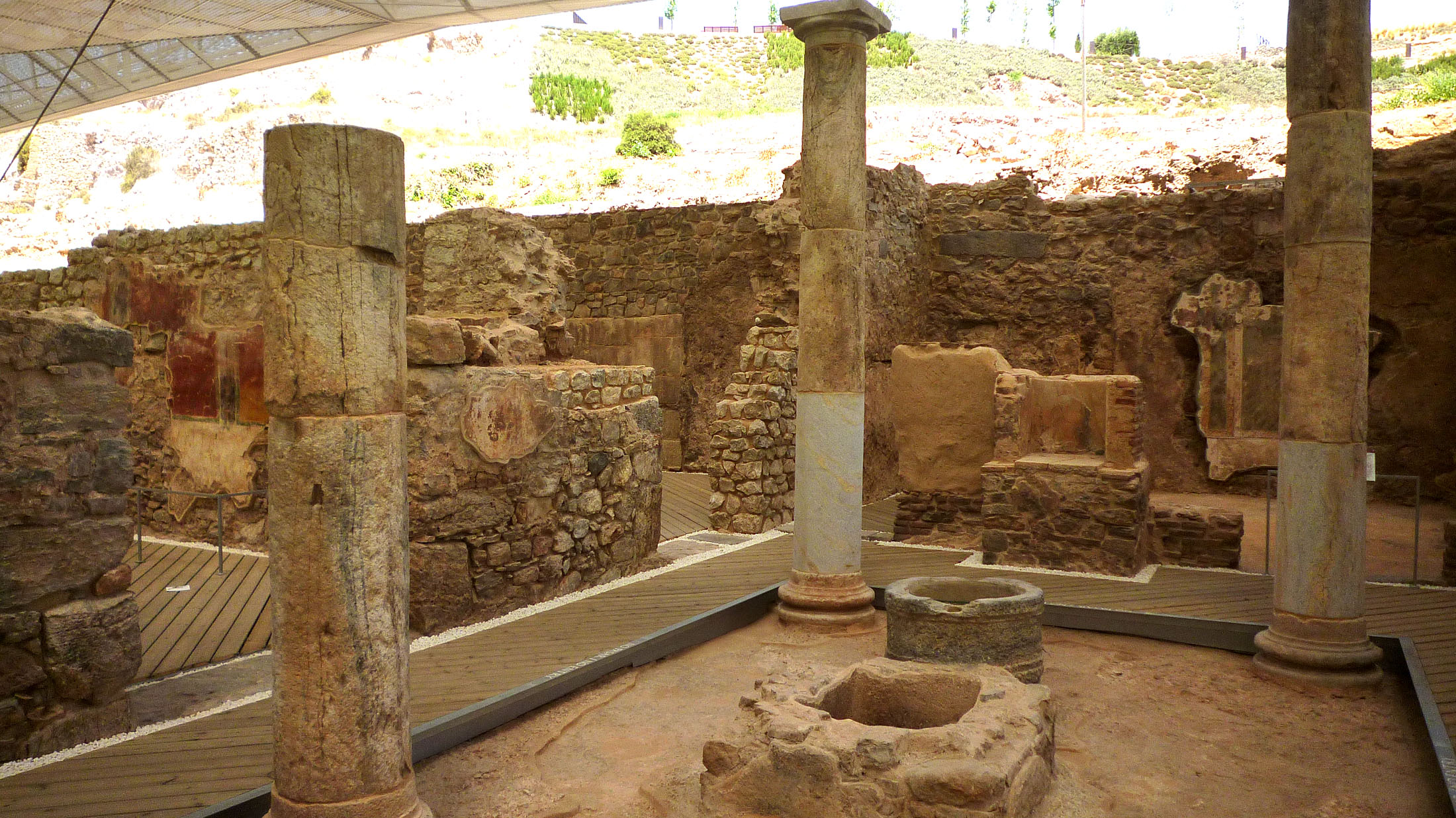 Edificio del atrio toscano en el barrio del foro romano de Cartagena (España).